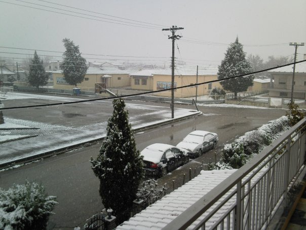 Χιονισμένη άποψη της πλατείας του Κεφαλοβρύσου με φόντο το δημοτικό σχολείο του χωριού.